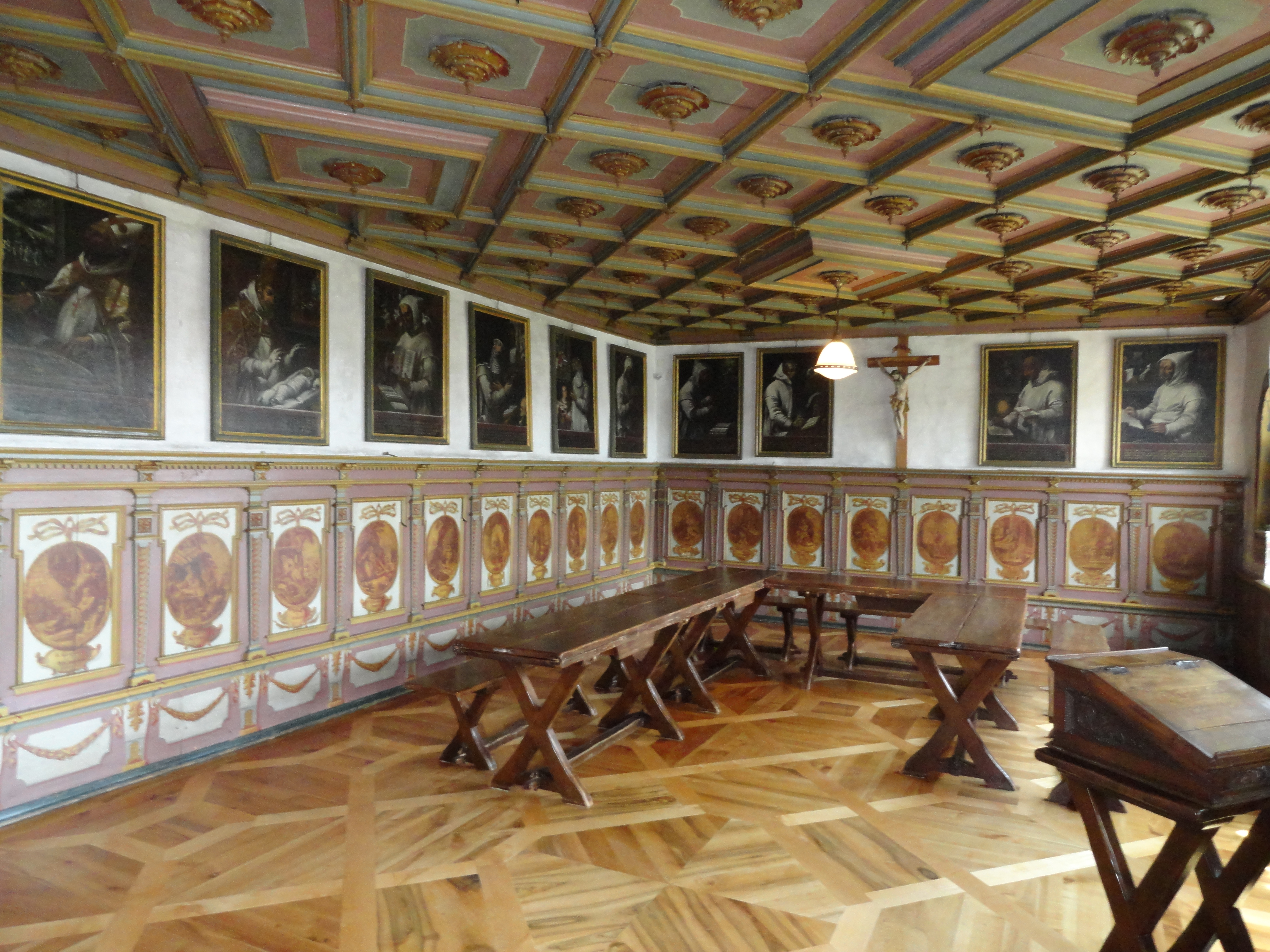 Kartause Ittingen